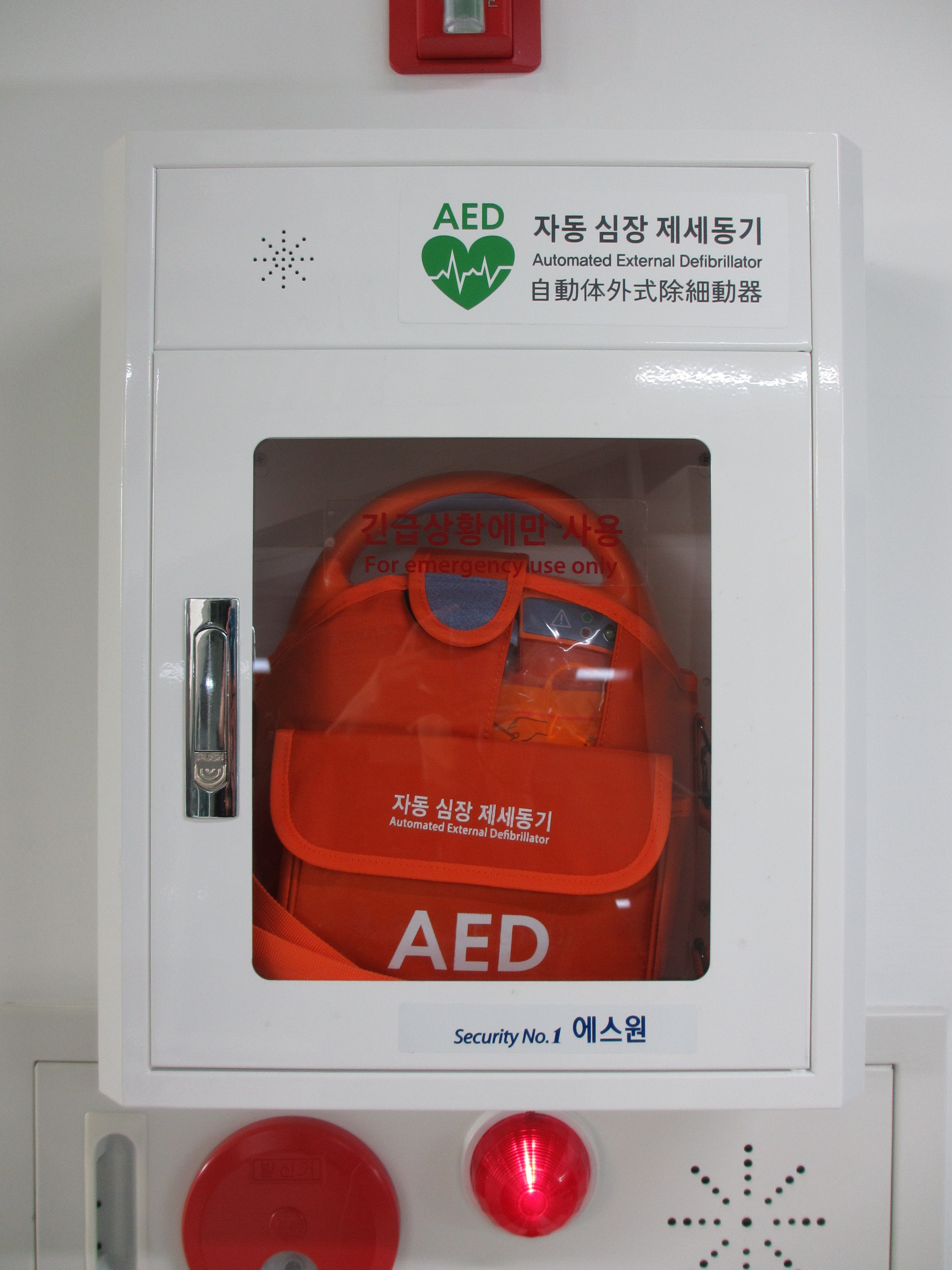 자동 제세동기